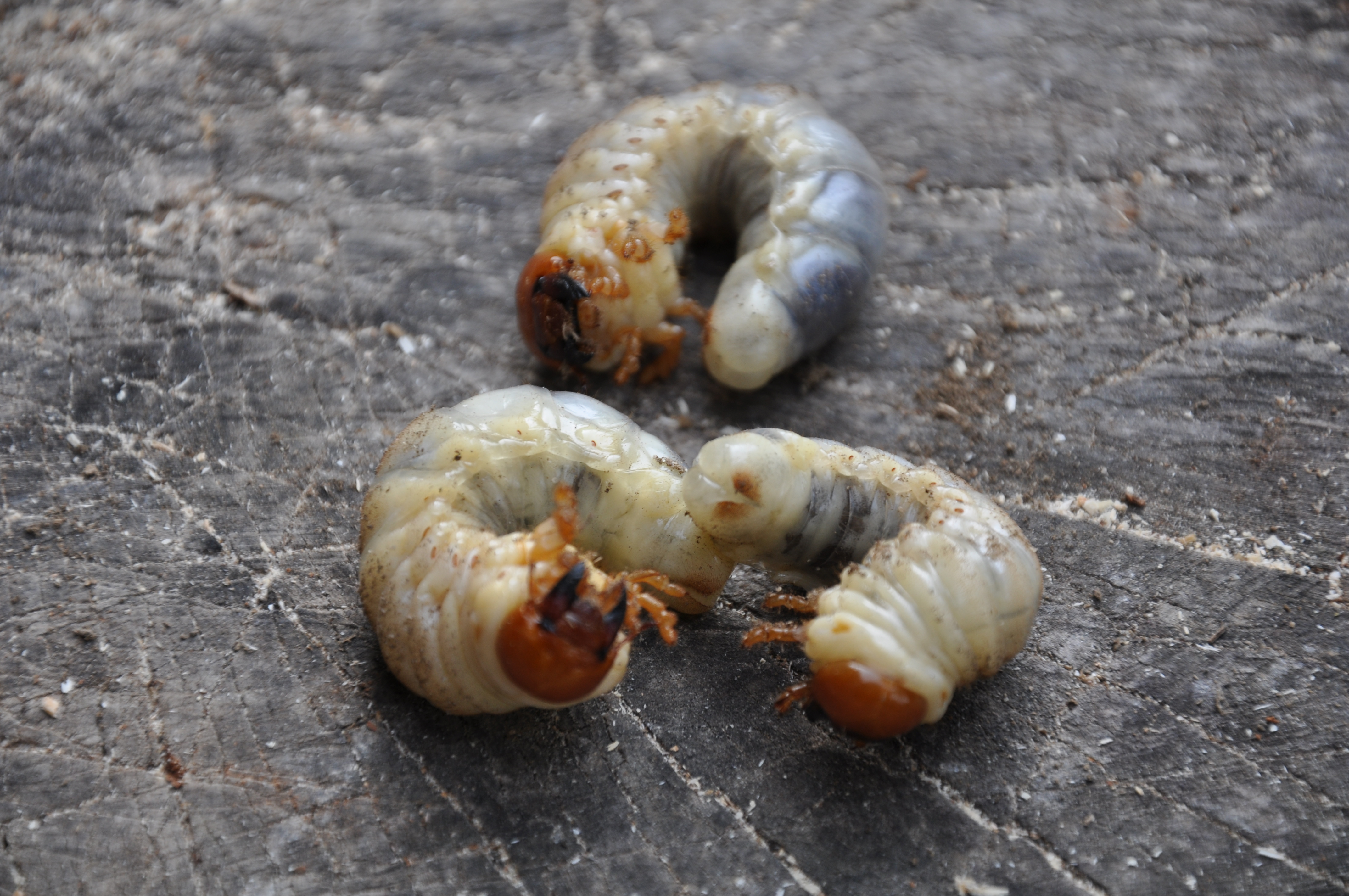 Nagy szarvasbogár pajor.